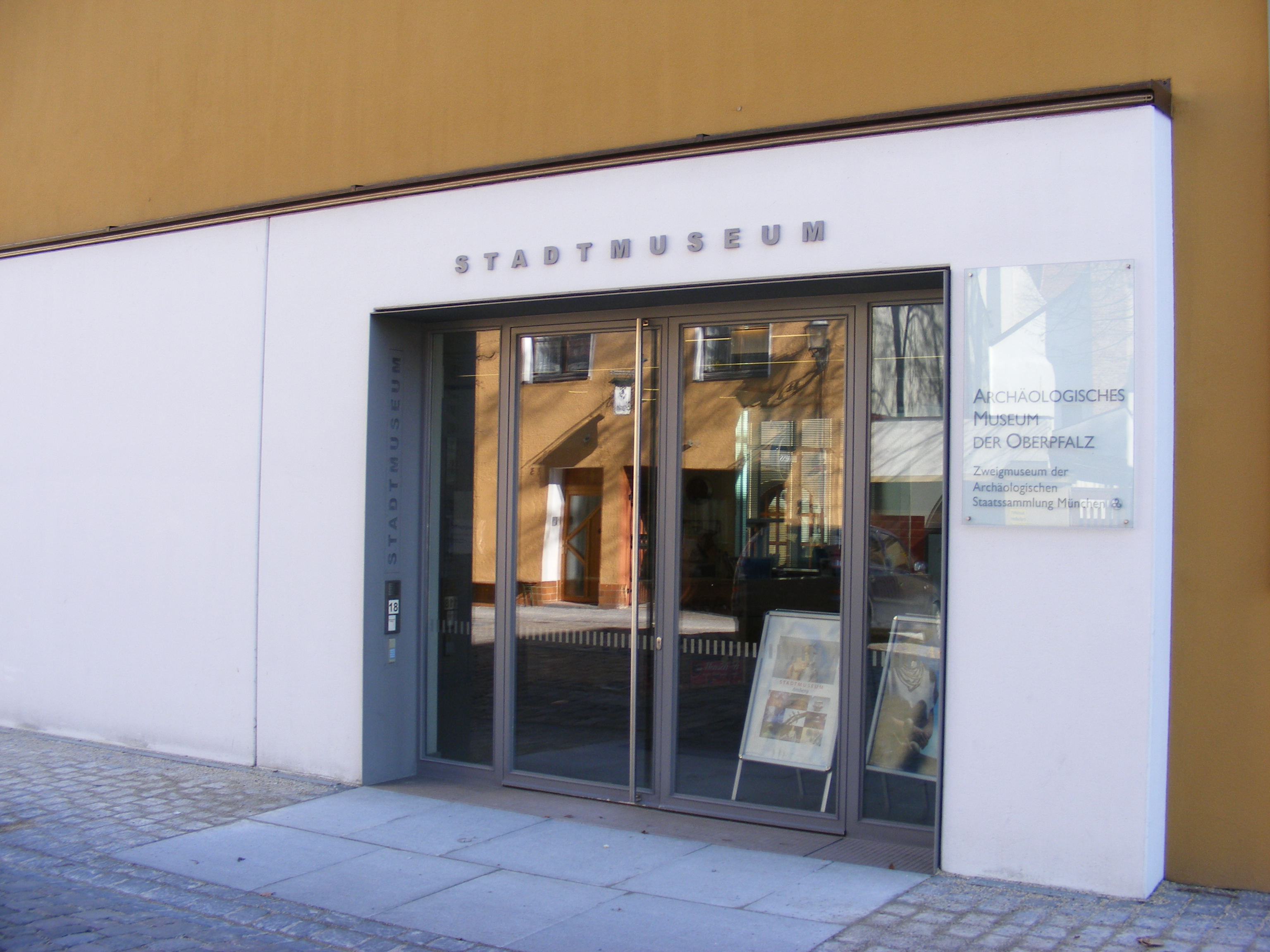 Amberg - Stadtmuseum und Archäologisches Museum der Oberpfalz (Eingang)